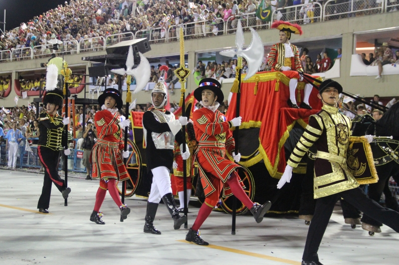 GRES União da Ilha do Governador, 2012.